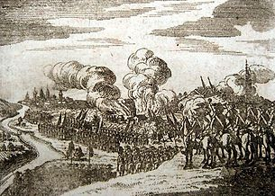 Grabado histórico de la batalla de Hastenbeck